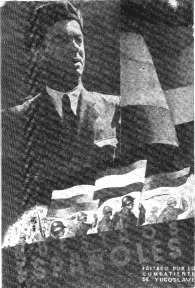 Srpskohrvatski / српскохрватски: Plakat sa likom Blagoja Parovića, člana CK KPJ, političkog komesara XIII internacionalne brigade u Španiji.